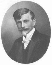 August Fournier (1850 - 1920), Česko-rakouský historik, vysokoškolský pedagog a politik.